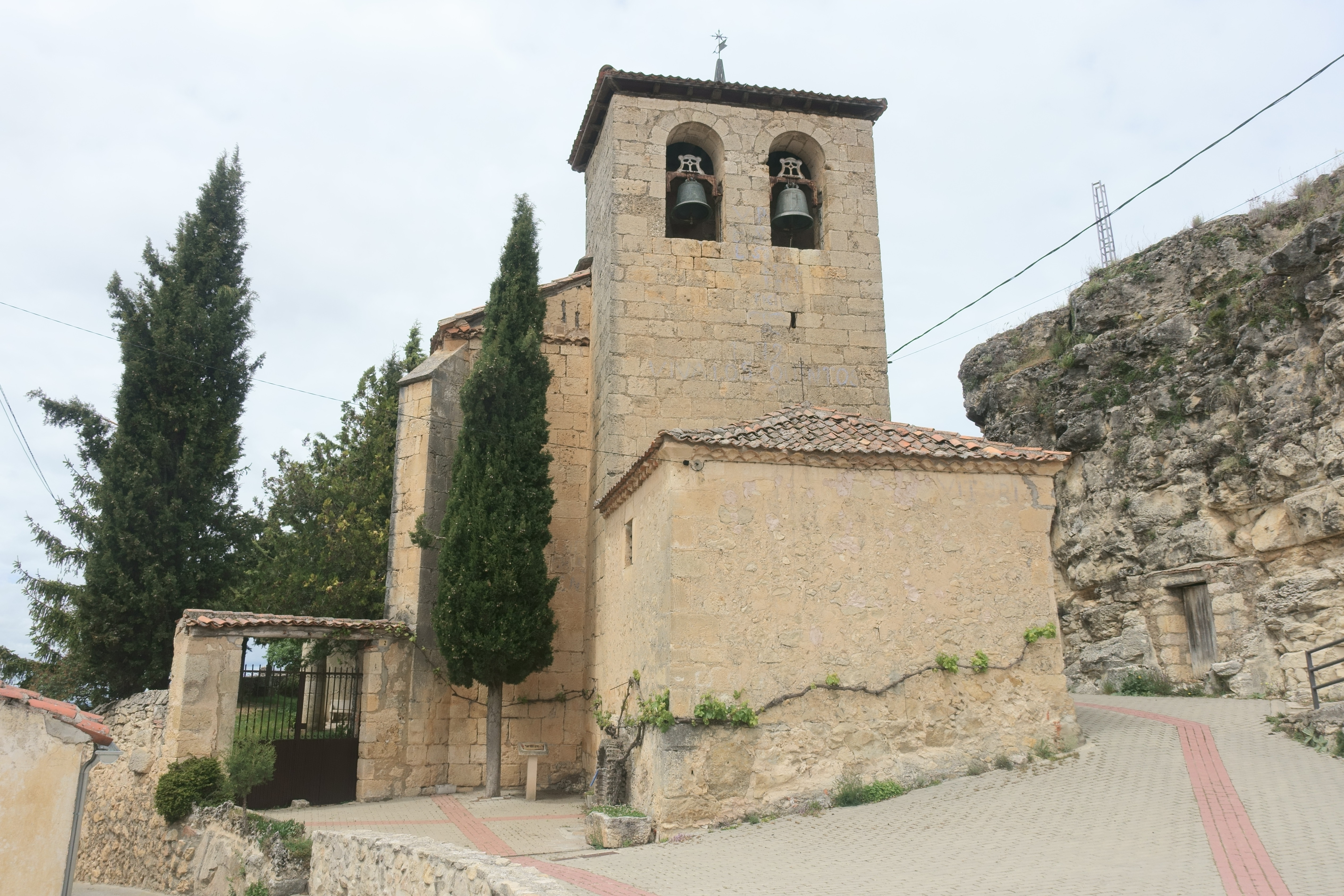 Iglesia de Nuestra Señora de la Esperanza, en Castrojimeno (Segovia, España).